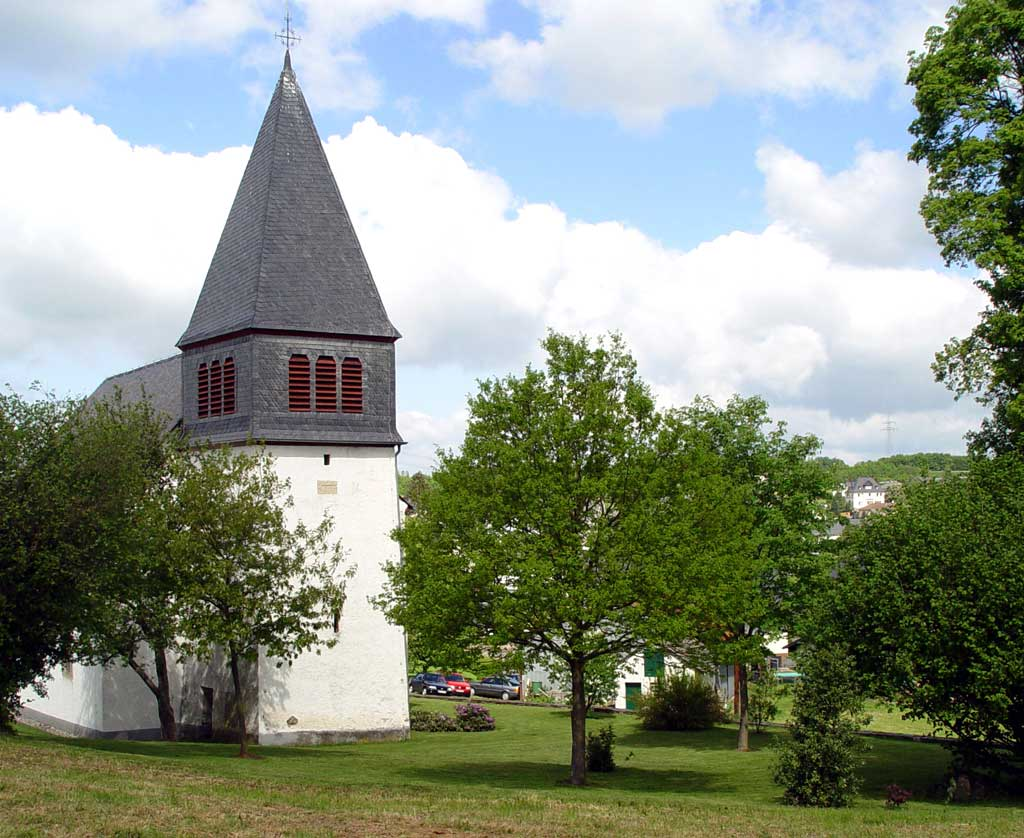 Evangelische Kirche Ohlweiler Fotografiert am 23.05.2004 Fotograf: Gerd A.T. Müller Copyright Status: GNU Freie Dokumentationslizenz